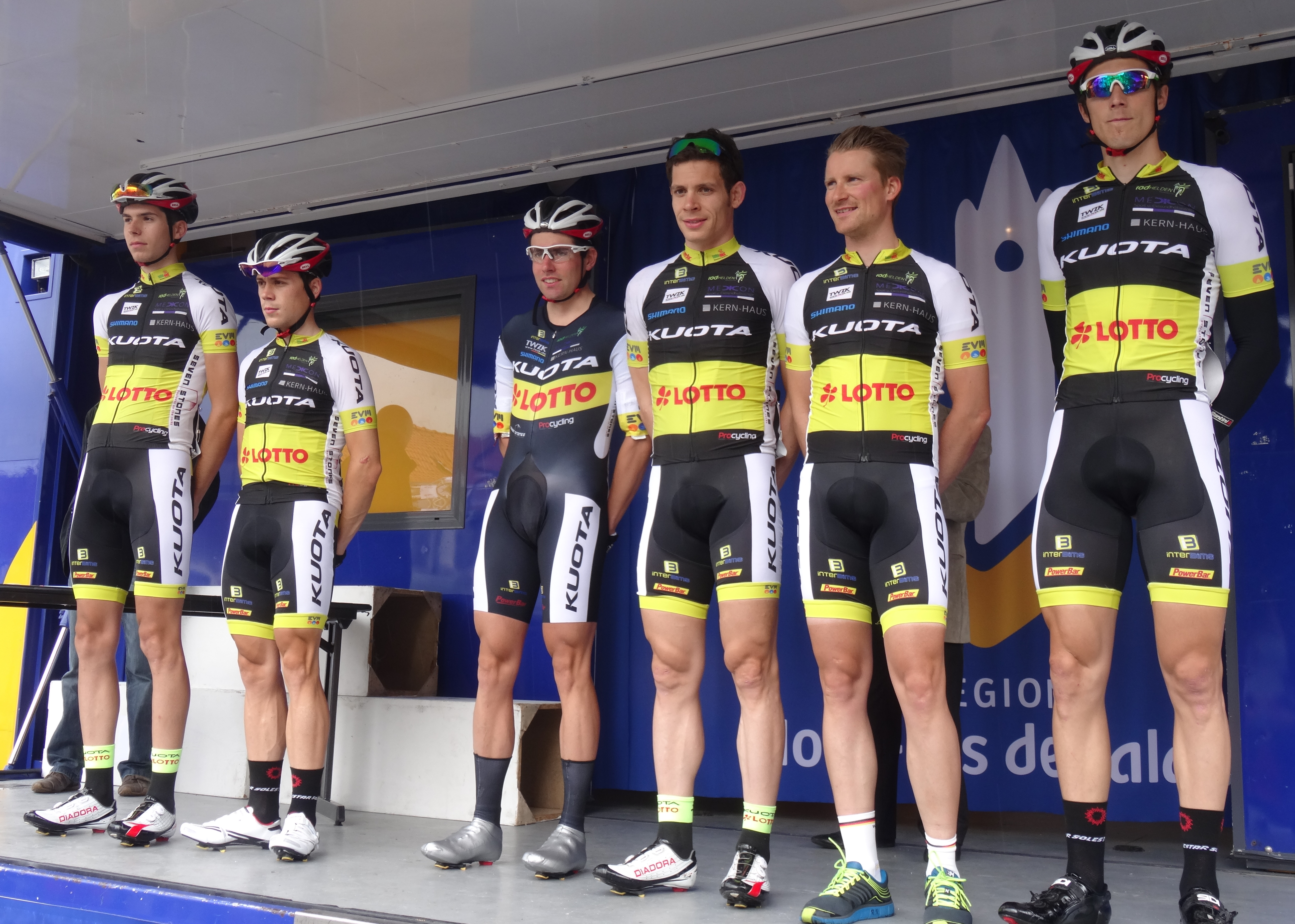 Reportage photographique réalisé le dimanche 13 juillet à l'occasion du départ et de l'arrivée de la Ronde pévéloise 2014 à Pont-à-Marcq, Nord-Pas-de-Calais, France.